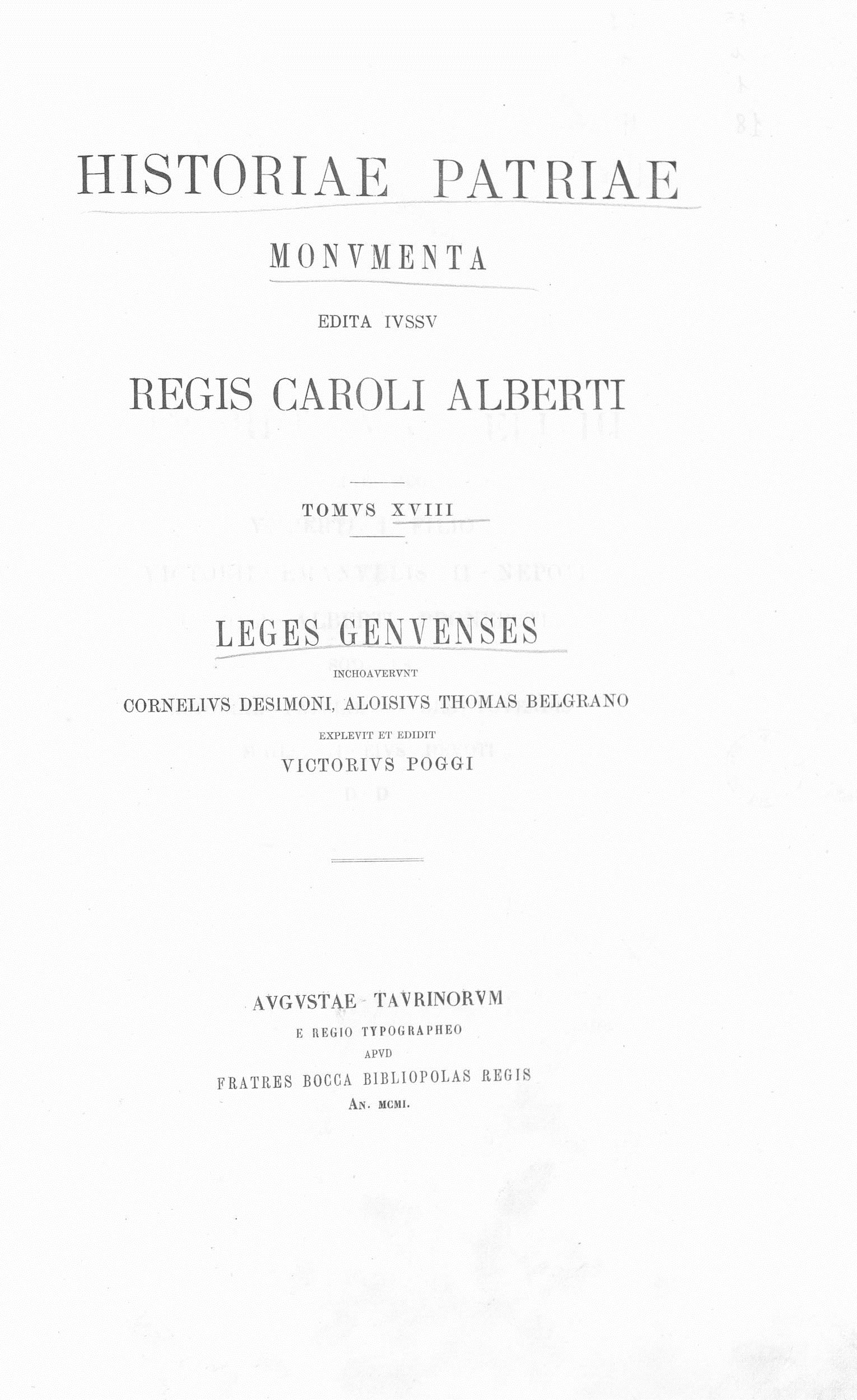 Frontespizio